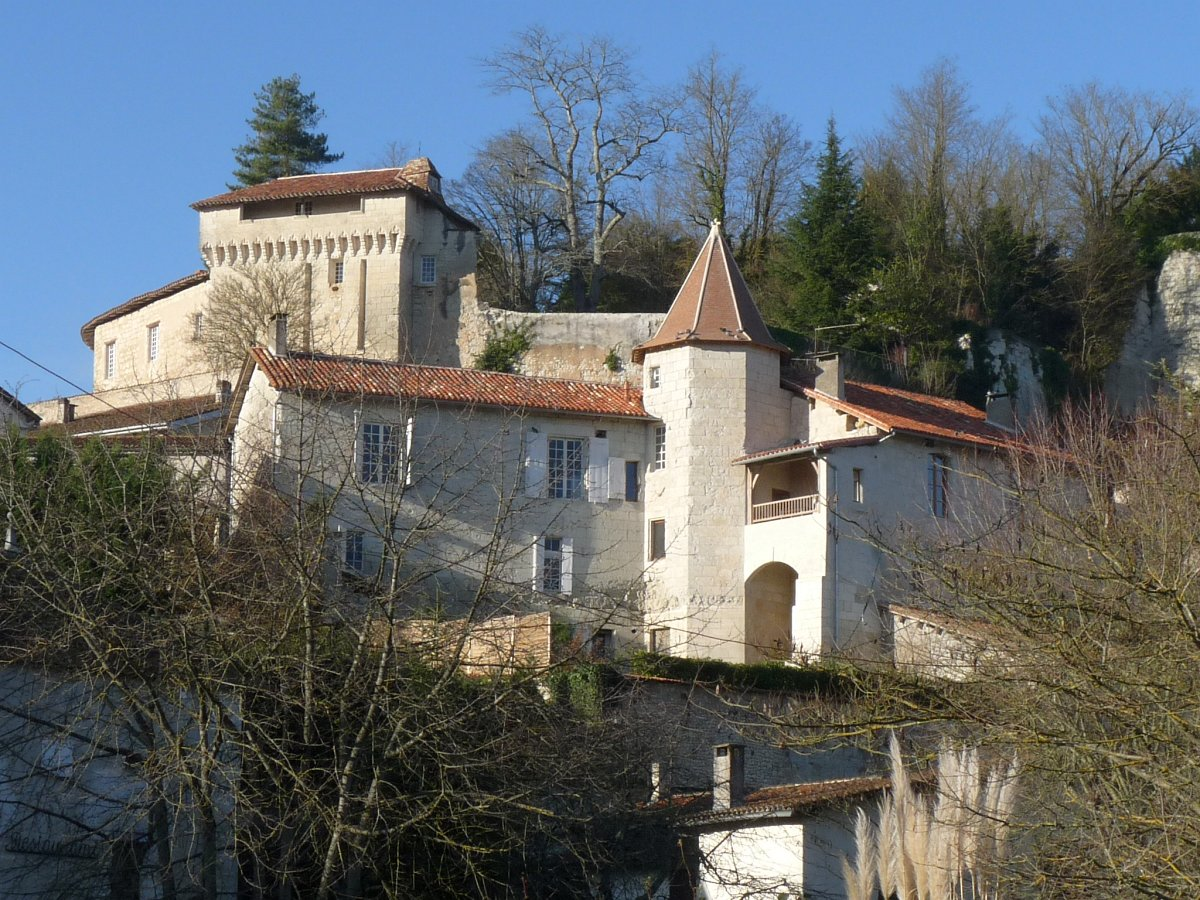 Vue du château d'Aubeterre depuis la Basse ville; Charente, France